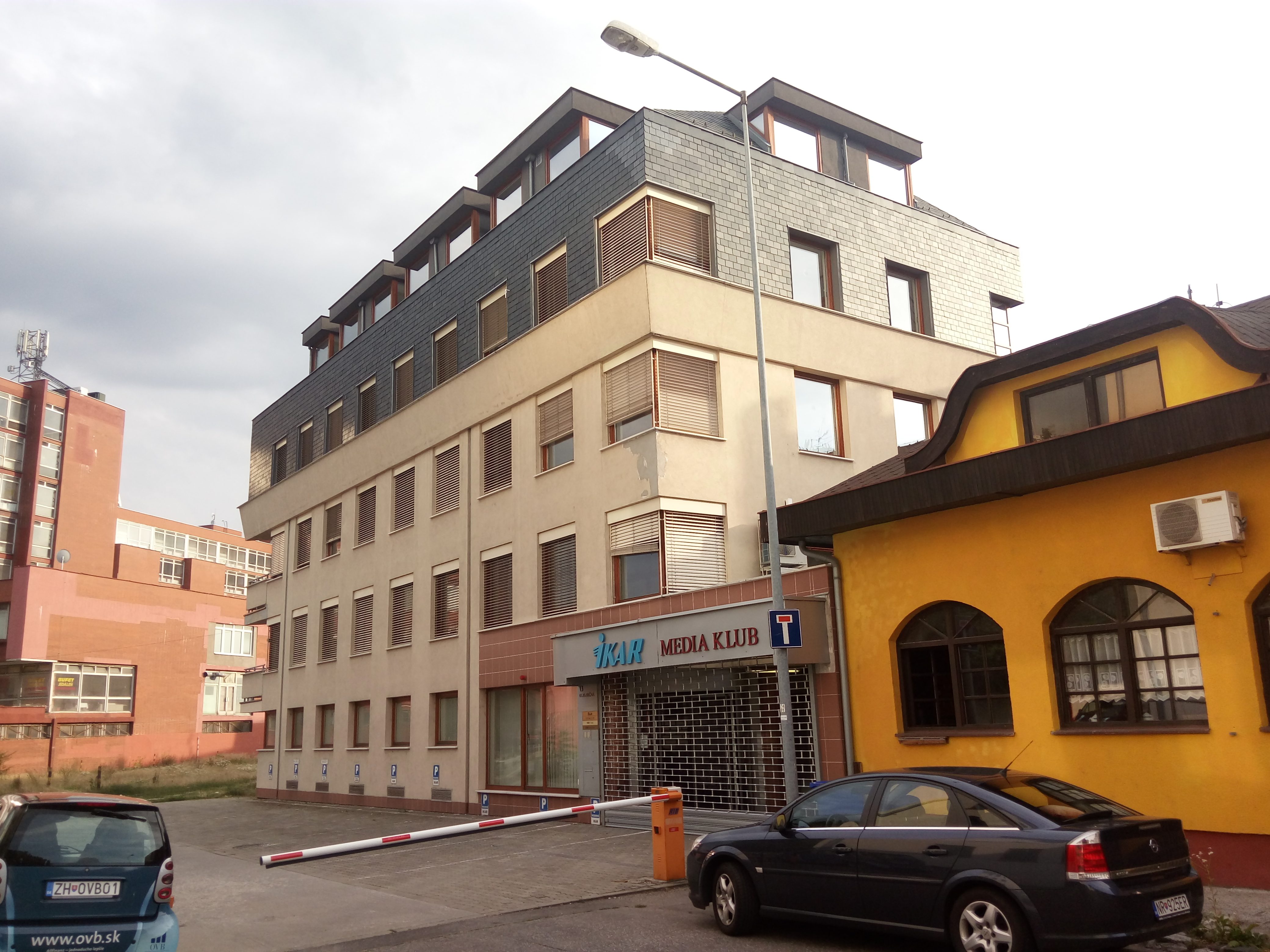 Kukuričná 13, Nové Mesto, Bratislava